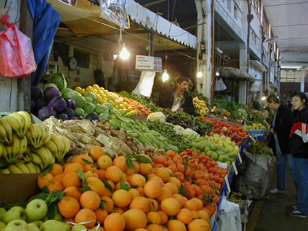 Nicosia fruit market